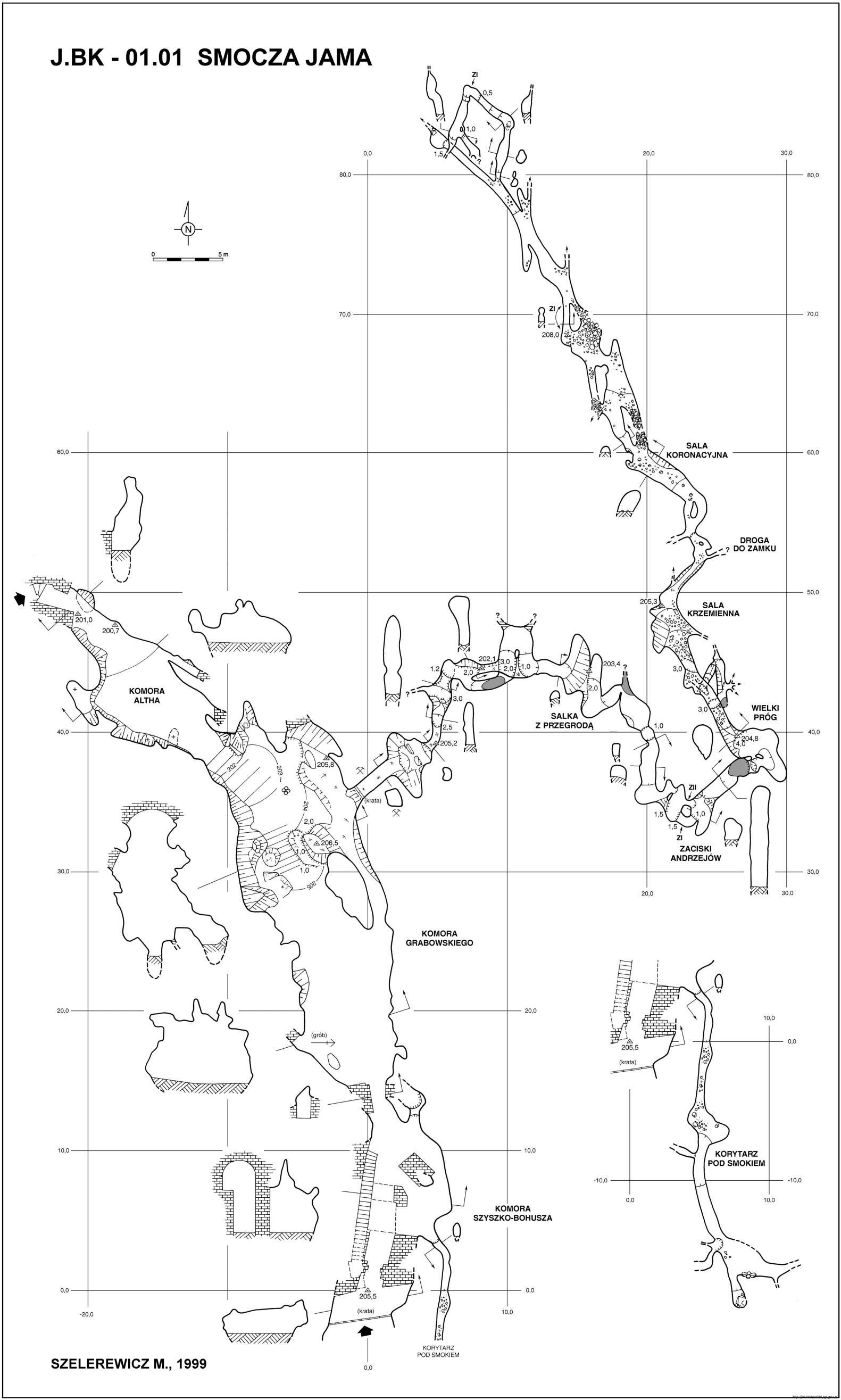 Smocza Jama w Krakowie - plan